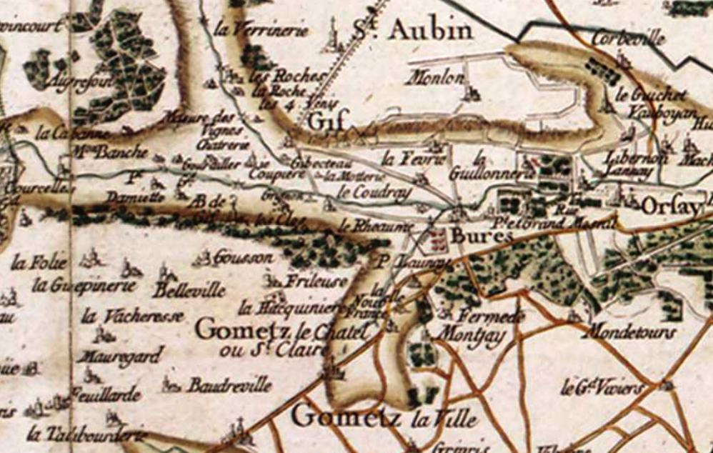 Carte de la région de Gif-sur-Yvette (91) au XVIIe siècle par Cassini.